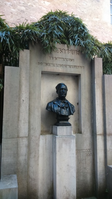 Statuo de Pasteur apud la naskiĝdomo en Dole